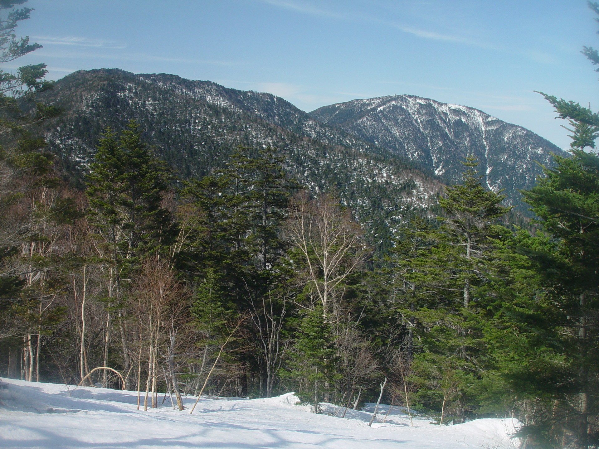 信州松本野麦峠スキー場から望む鉢盛山